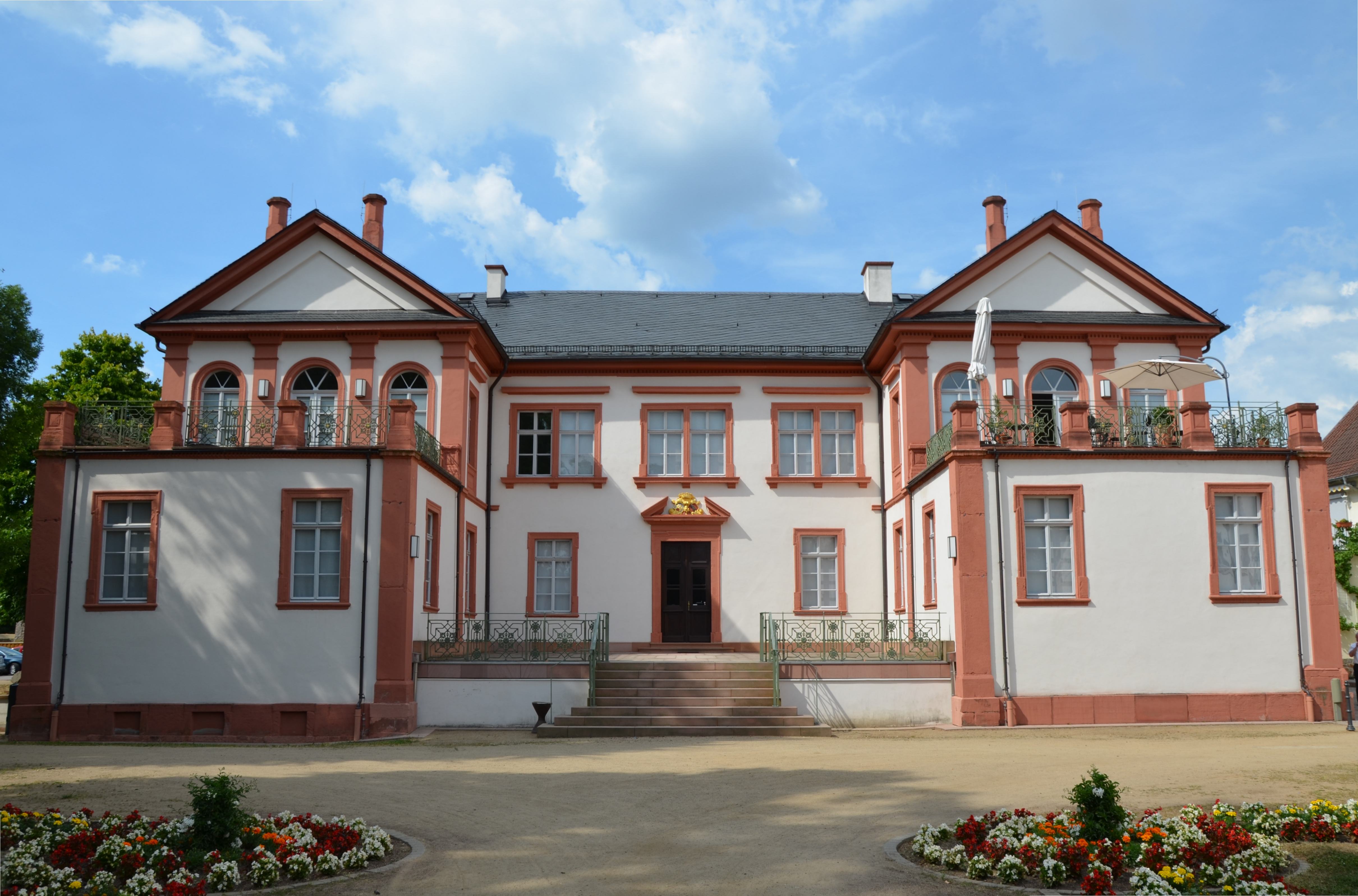 Museum Schloss Fechenbach, Dieburg, Germany